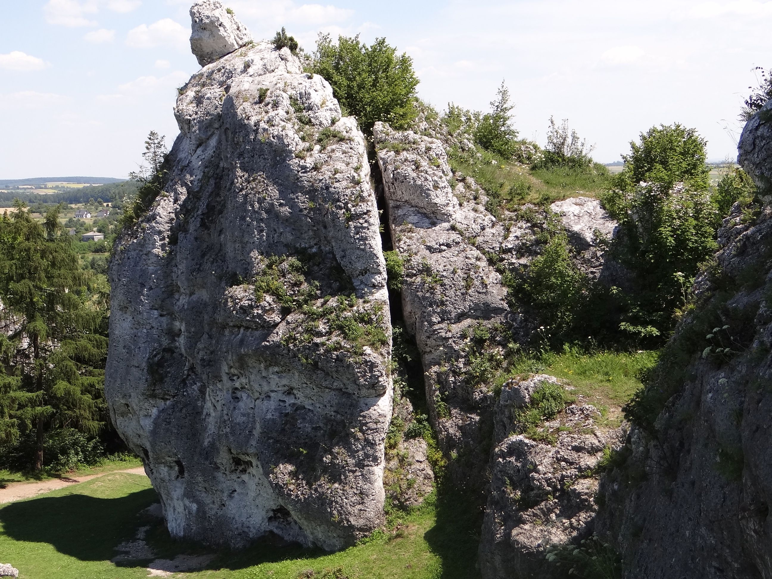 Skała Adept na Zamku Ogrodzieniec w Podzamczu